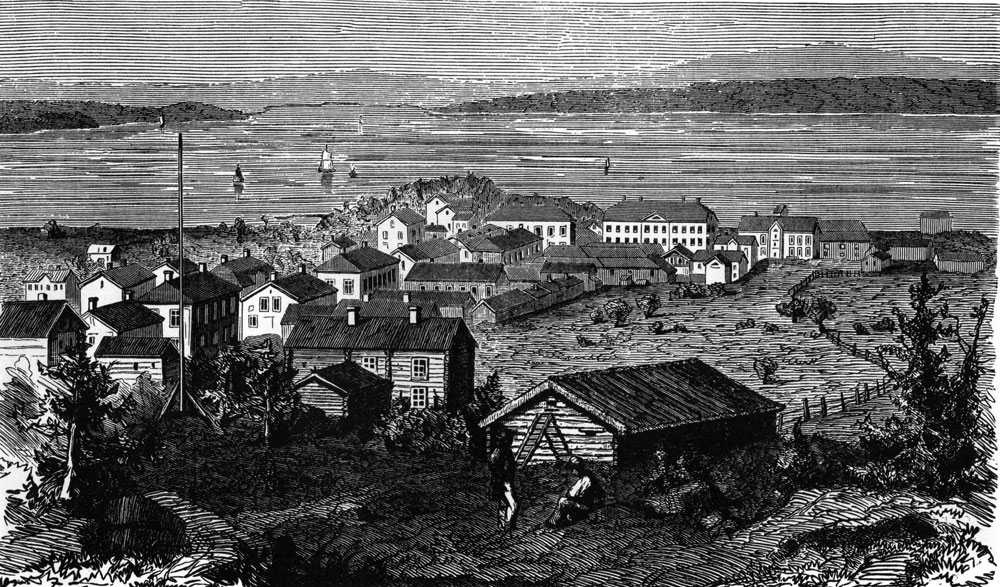 Örnsköldsvik